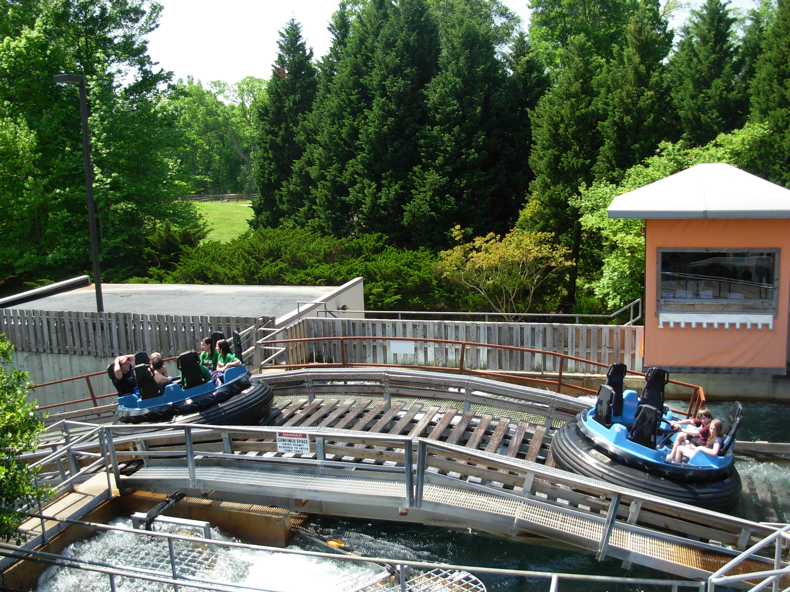 Busch Gardens Europe, Williamsburg Roller coasters Amusement rides